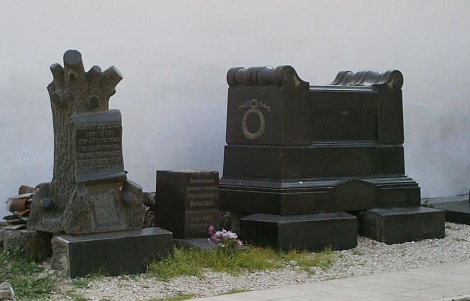 Караимские надгробия 19 - начала 20 веков. Караимские надгробия (мацевы), оставшиеся после разрушения караимского кладбища в Евпатории.